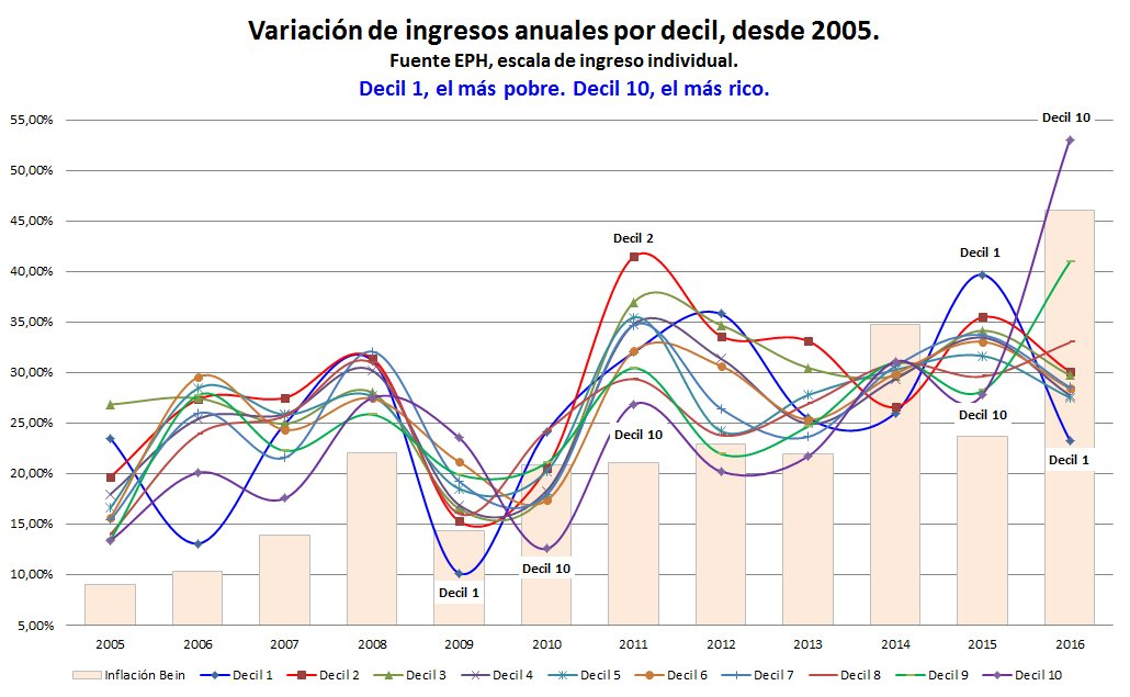 Variación de ingresos anuales por decil. Argentina. 2005-2016 Fuente: EPH, Indec.